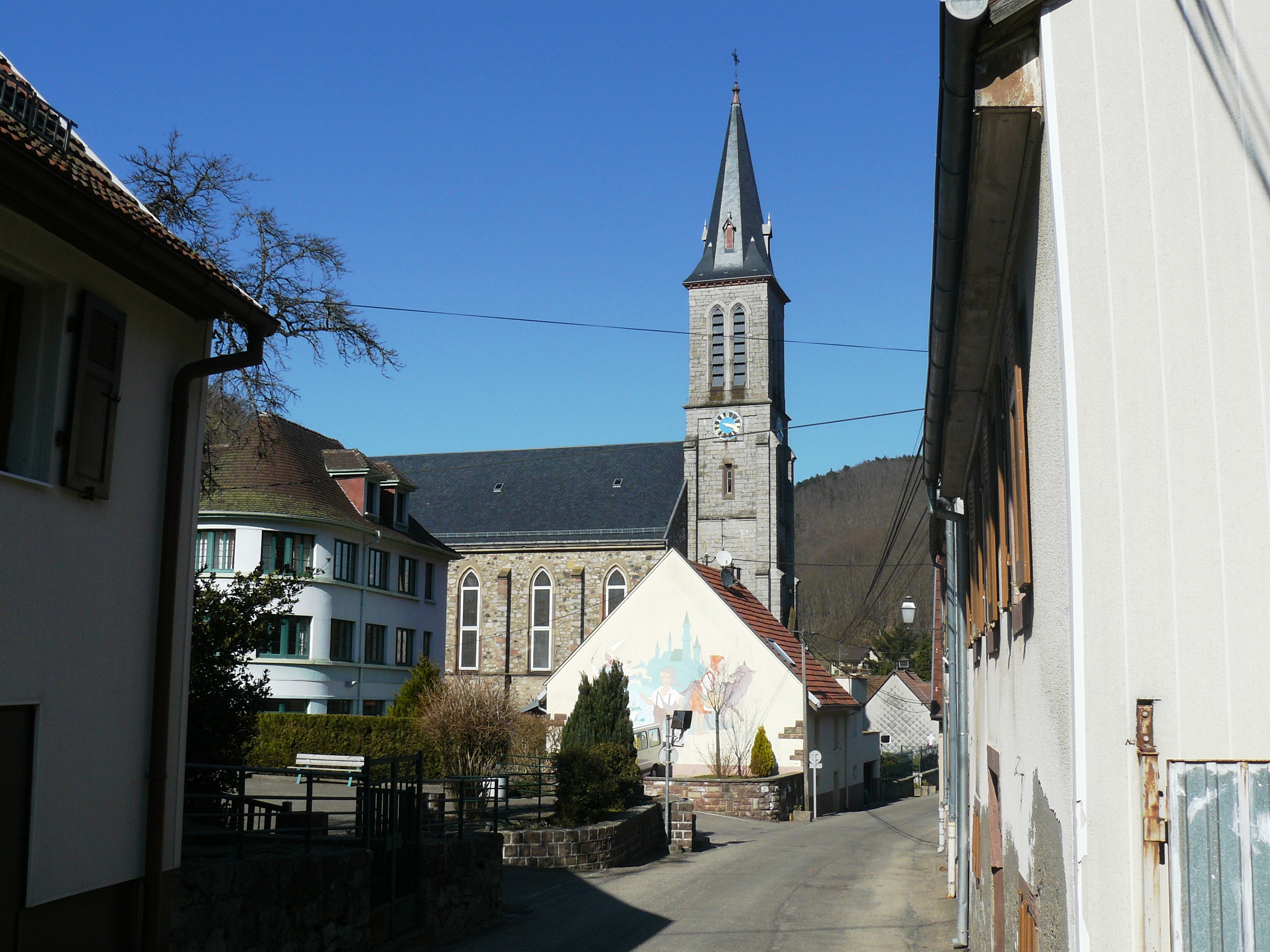 Église de l'Épiphanie